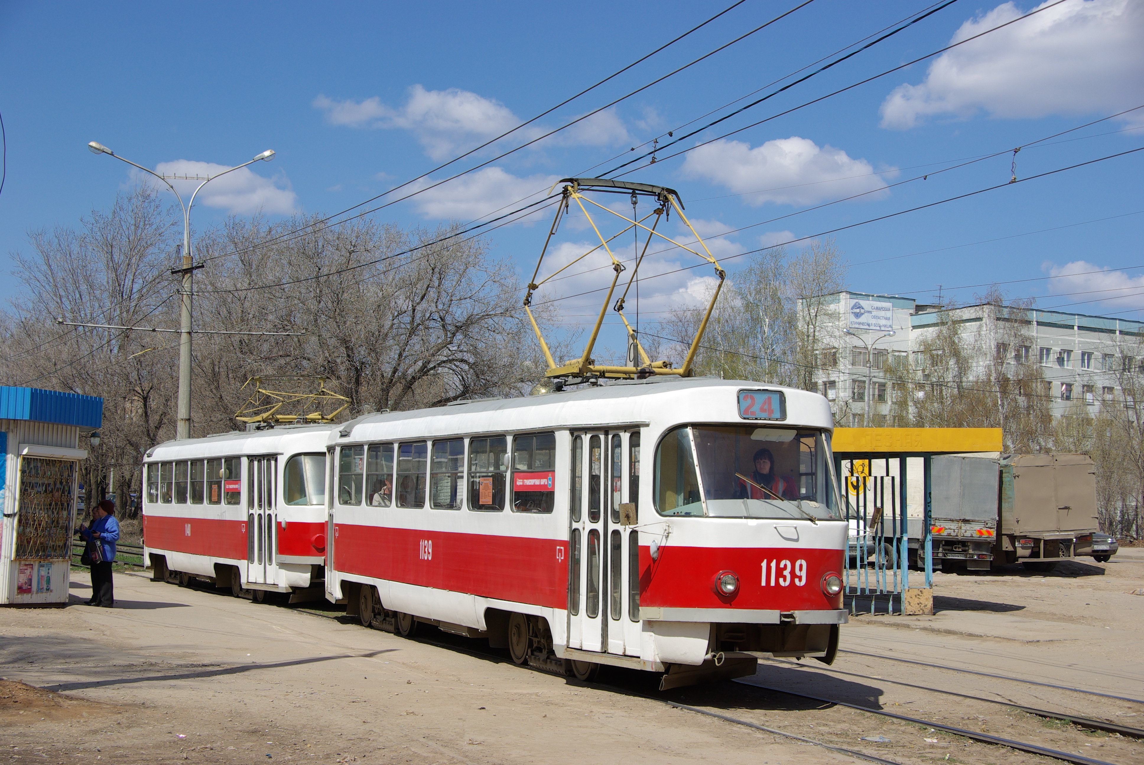 Samara tram Tatra T3SU